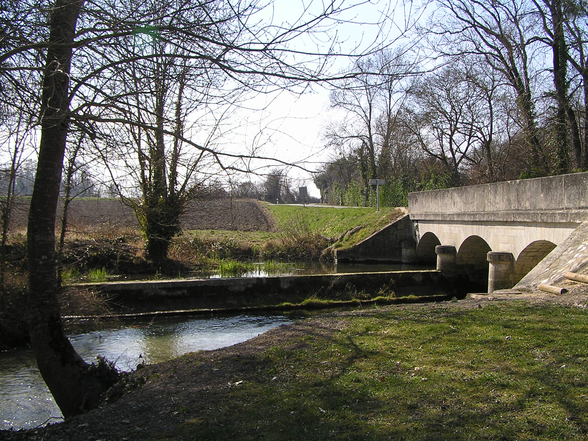 l'antenne et le Briou se rejoignent à Prignac